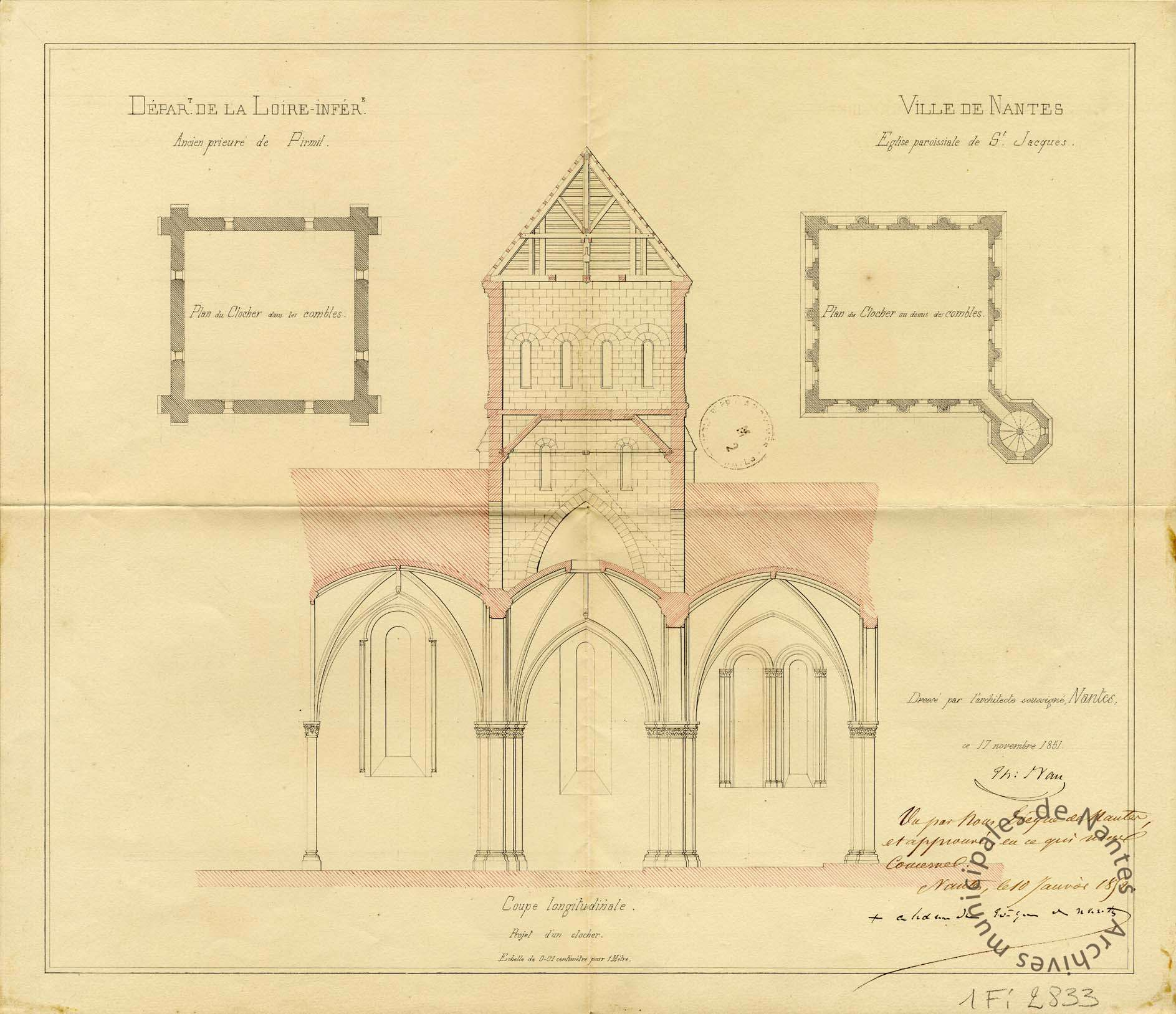 Coupe longitudinale. Projet d'un clocher pour l'église Saint-Jacques de Pirmil à Nantes en France. Plan dressé par l'architecte Th. Nau